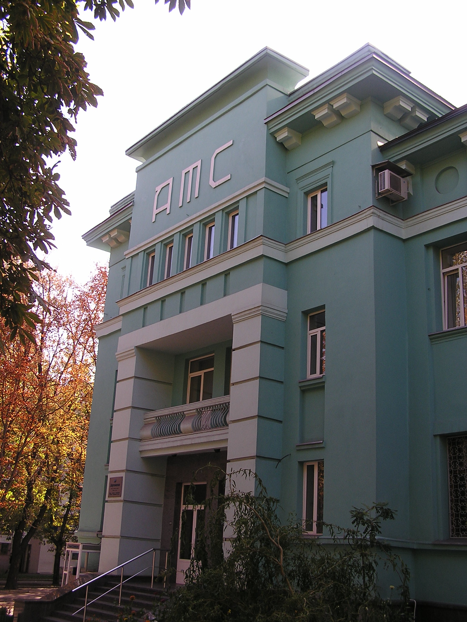 Донецк. Здание АТС-92 в котором располагается музей связи